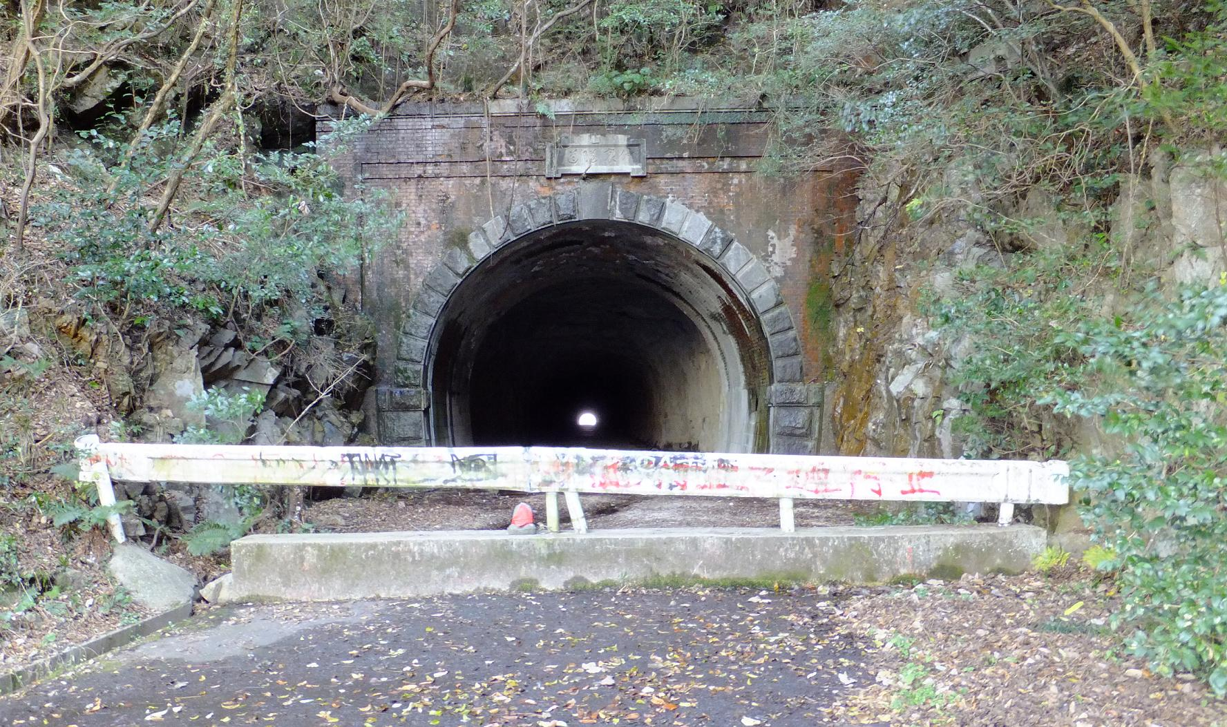 仲哀隧道 みやこ町側からの撮影